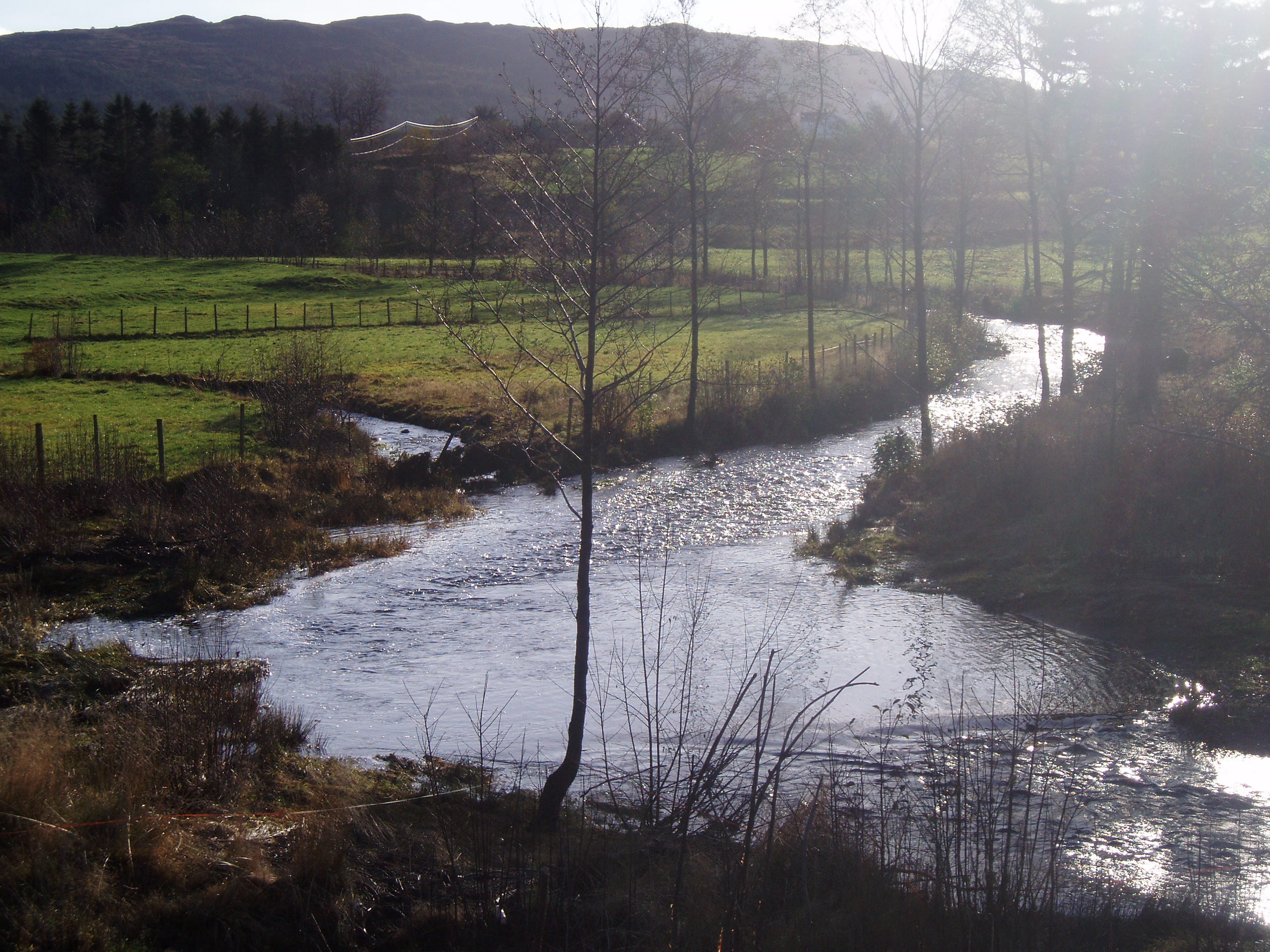 Fitjar River, near Fitjarstølane.